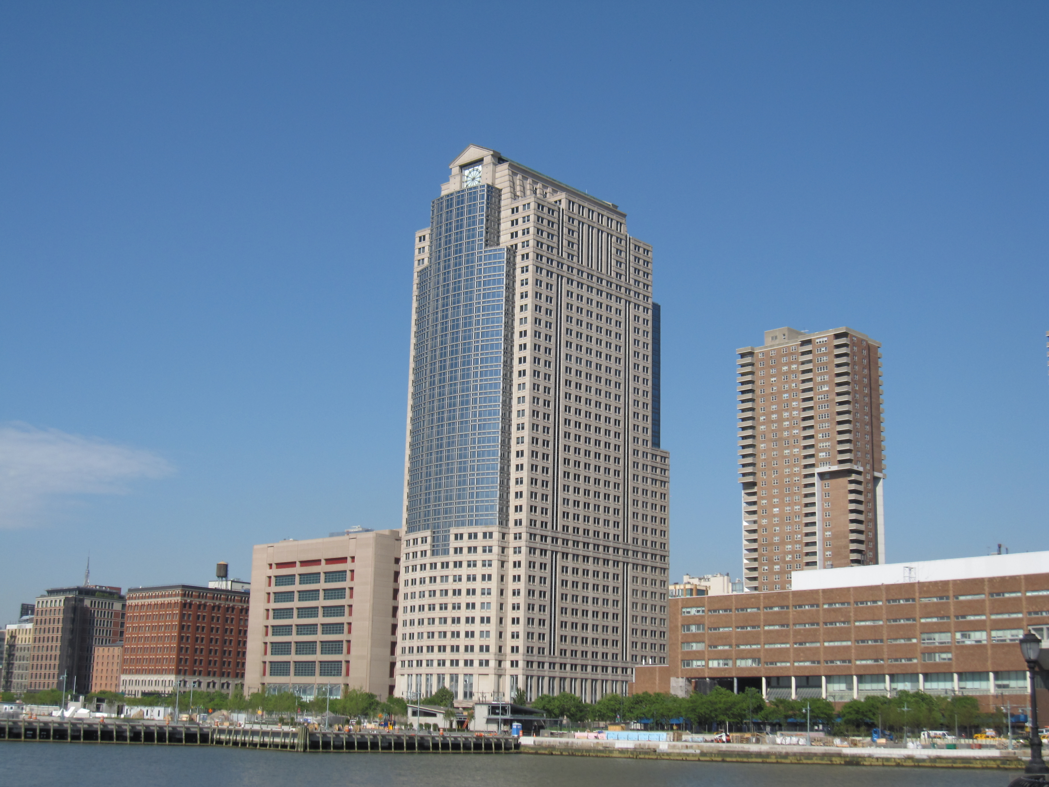 388 Greenwich Street